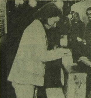 La candidata a vicepresidenta de Argentina del Frente Justicialista de Liberación, María Estela (Isabel) Martínez de Perón emite su voto en las elecciones presidenciales del 23 de septiembre de 1973, donde resultó elegida vicepresidenta.